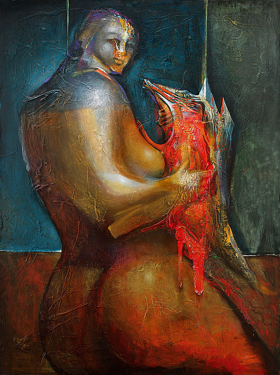 Woman with Fox - 200x150 - acryl,oil - 2004